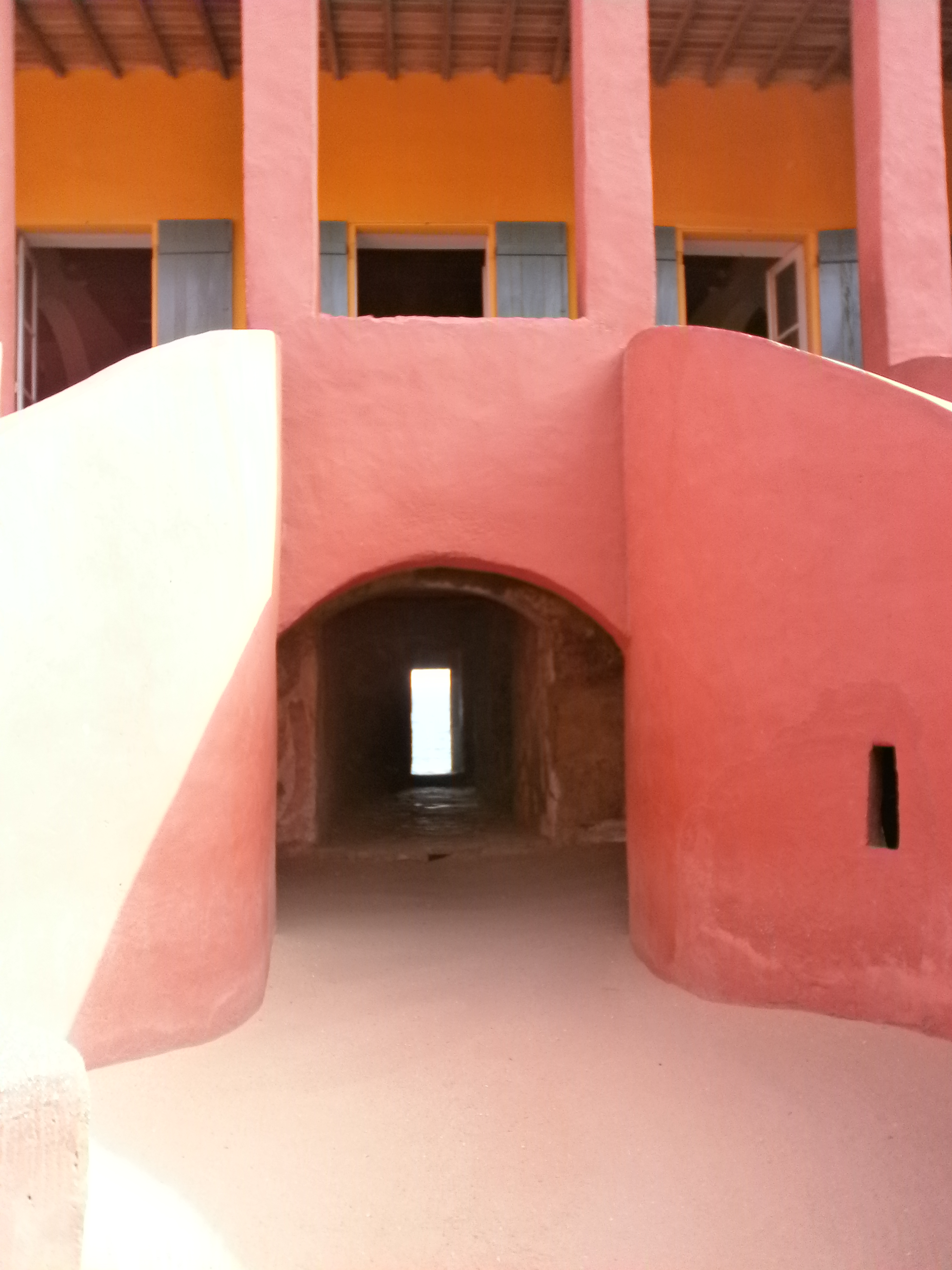 Gorée - Maison des esclaves